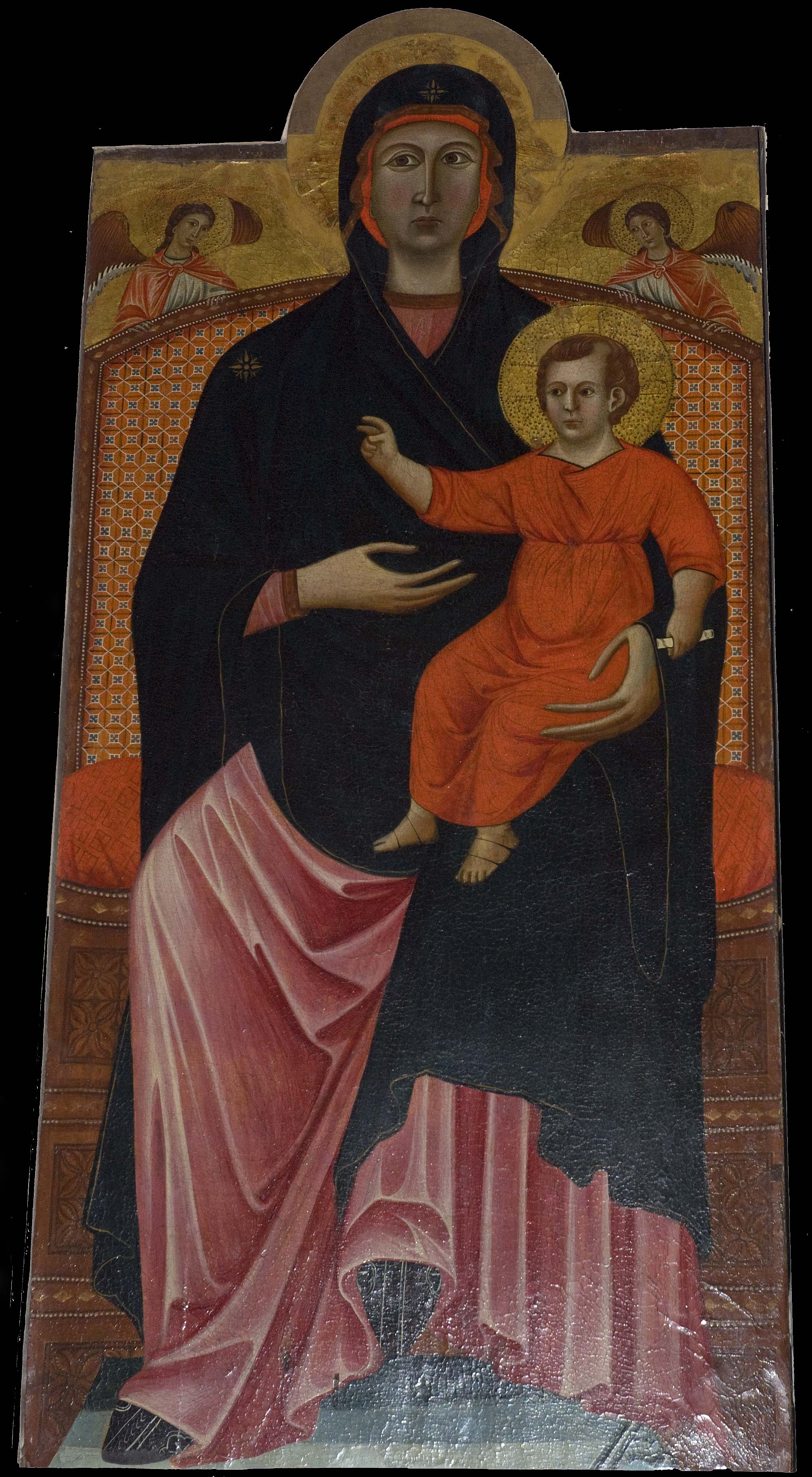 Vergine col Bambino, attribuita alla scuola di Cimabue o a Giotto giovane, pieve di santa maria assunta , a stia